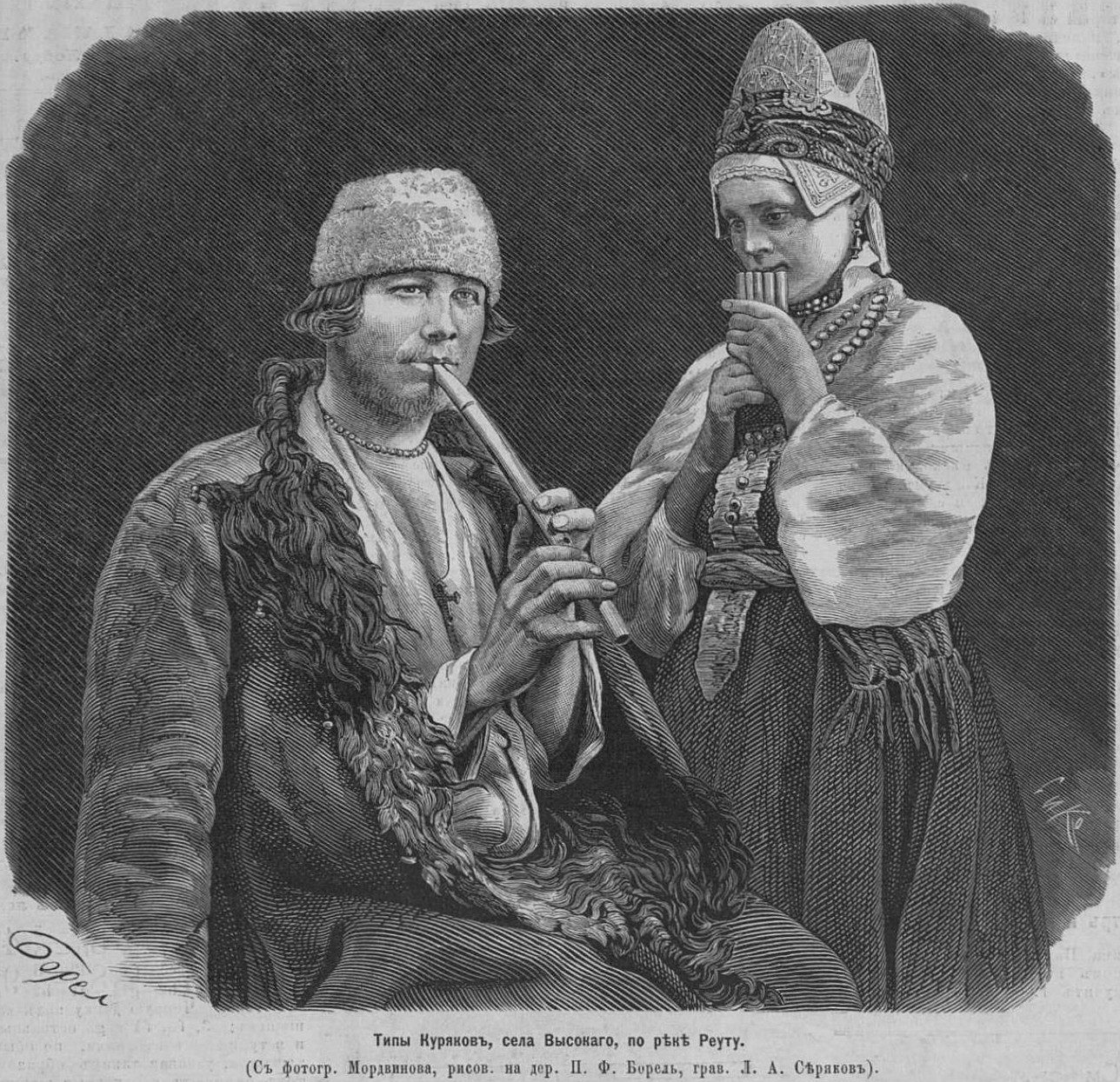 Иллюстрация к статье А. Мордвинова "Весна в Курской губернии". Подпись внизу рисунка: "Типы Куряков, села Высокого по реке, Реуту". Примечания: Женский головной убор — двугребенной, или седлообразный кокошник. Эта же иллюстрация используется в книге: Финдейзен Н. Очерки по истории музыки в России. Том 1, выпуск 2. — М.-Л.: ГИз, 1928. — С. 207.